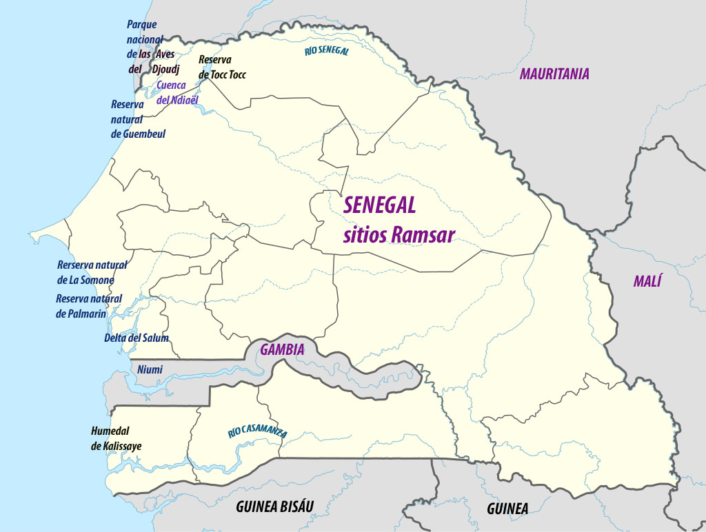 Mapa de sitios Ramsar de Senegal